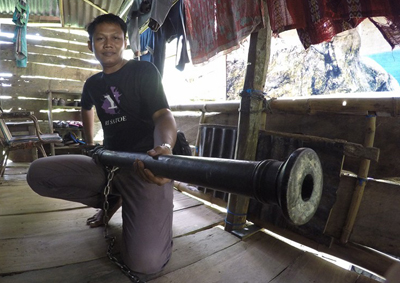 Meriam kuno kategori Cetbang yang ditemukan di Pulau Selayar (foto: Sharben Sukatanya - Selayar)